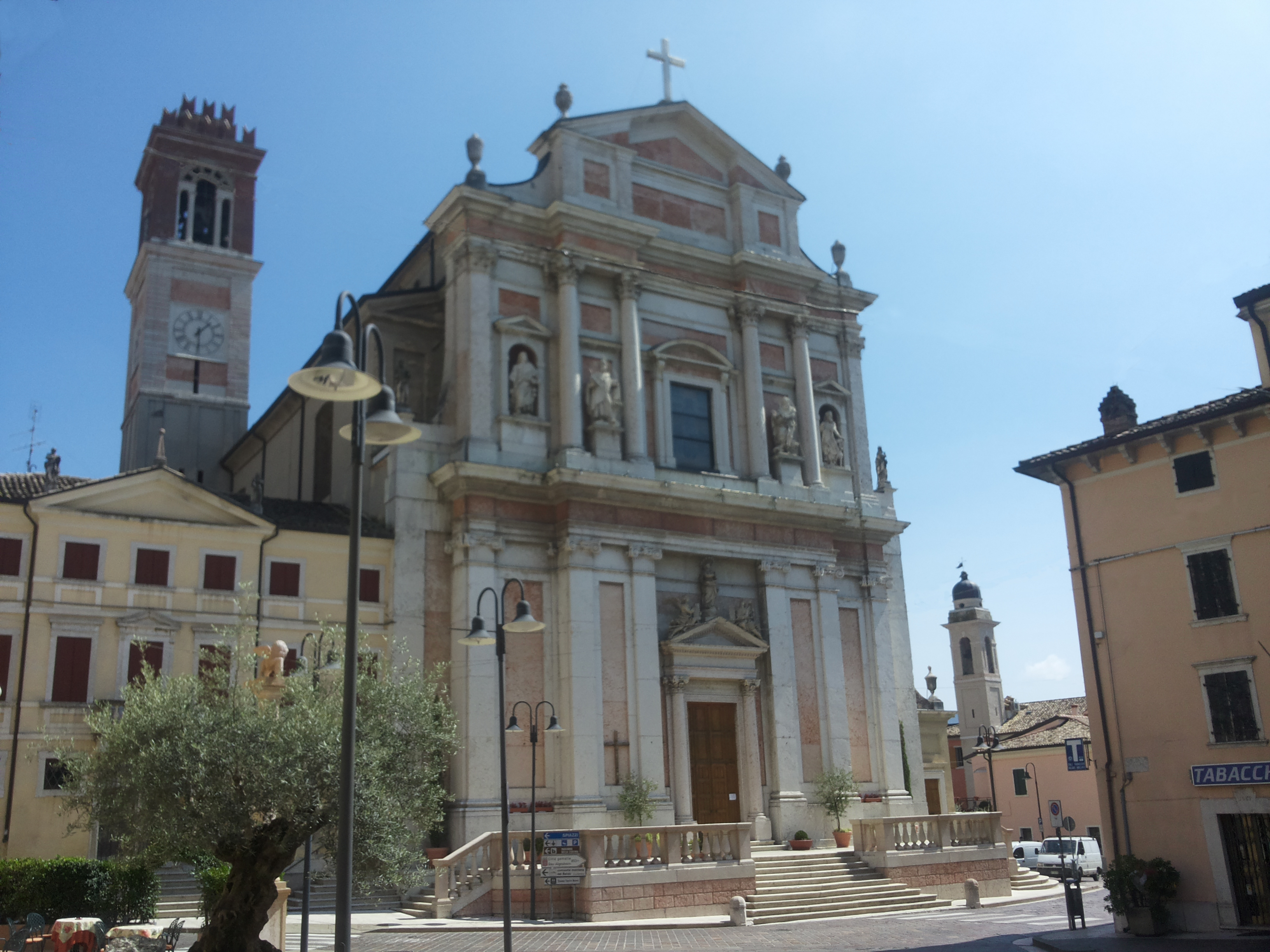 Facciata della chiesa di Caprino Veronese